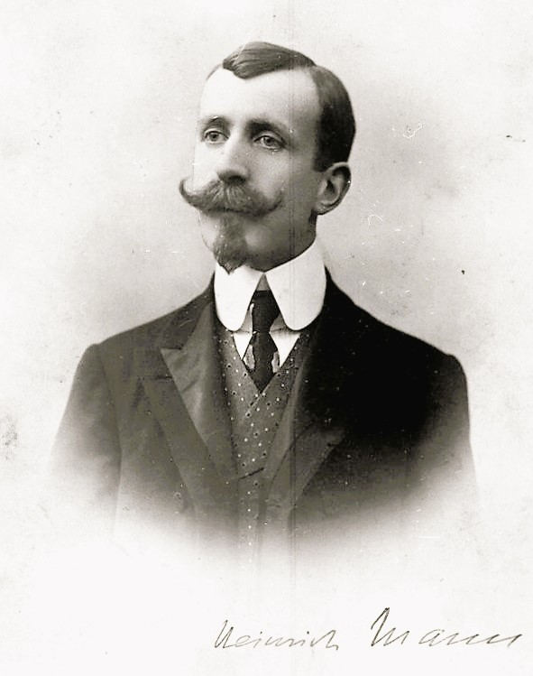 Zentralbild Heinrich Mann, Schriftsteller, bedeutender bürgerlicher kritischer Realist, Geb: 27.3. 1871 in Lübeck gest: 12.3.1950 in Santa Monica (Kalifornien) UBz: eine Aufnahme aus dem Jahre 1906